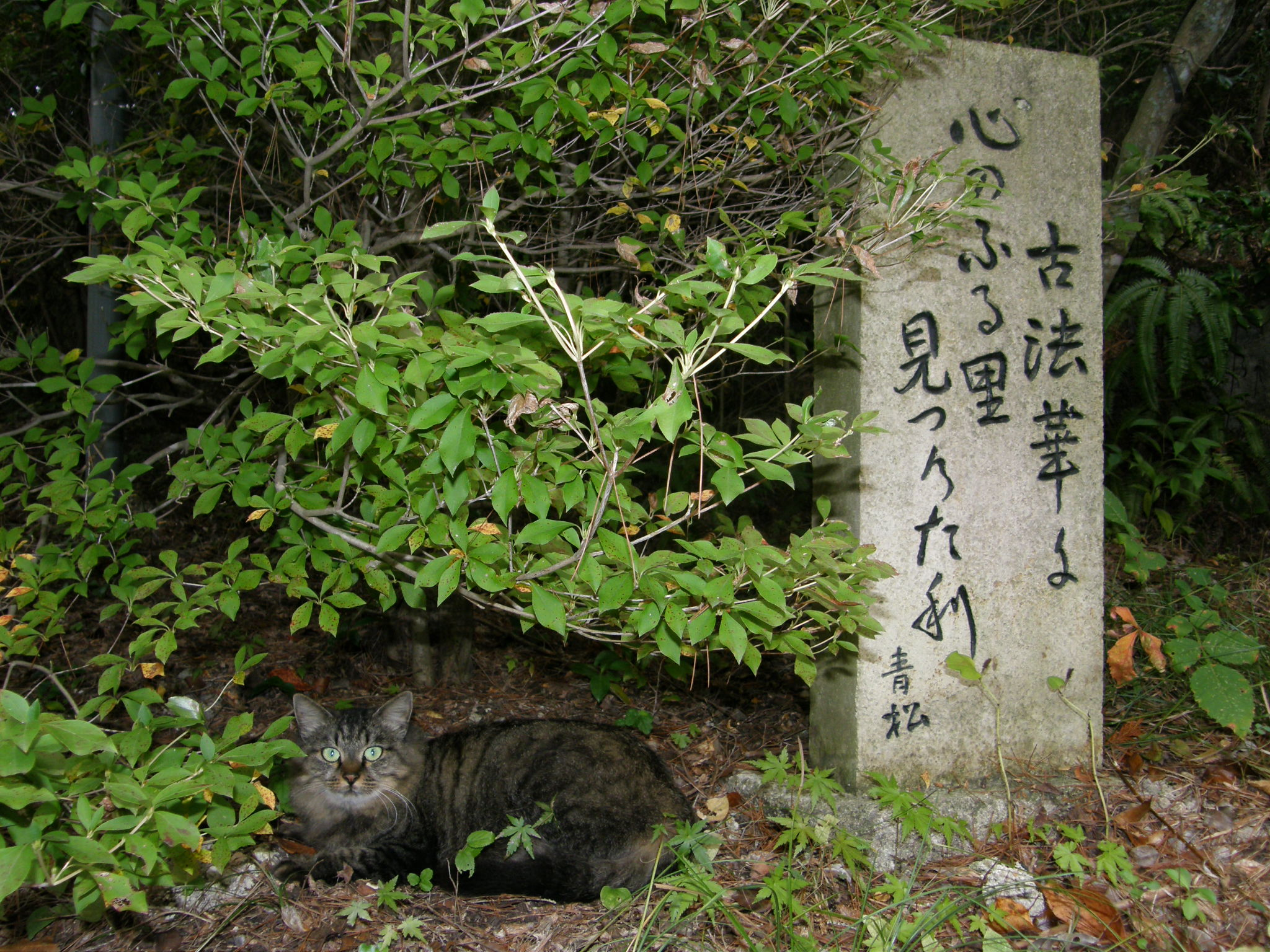 Kasai-Furubokke-nature park 古法華自然公園 加西市